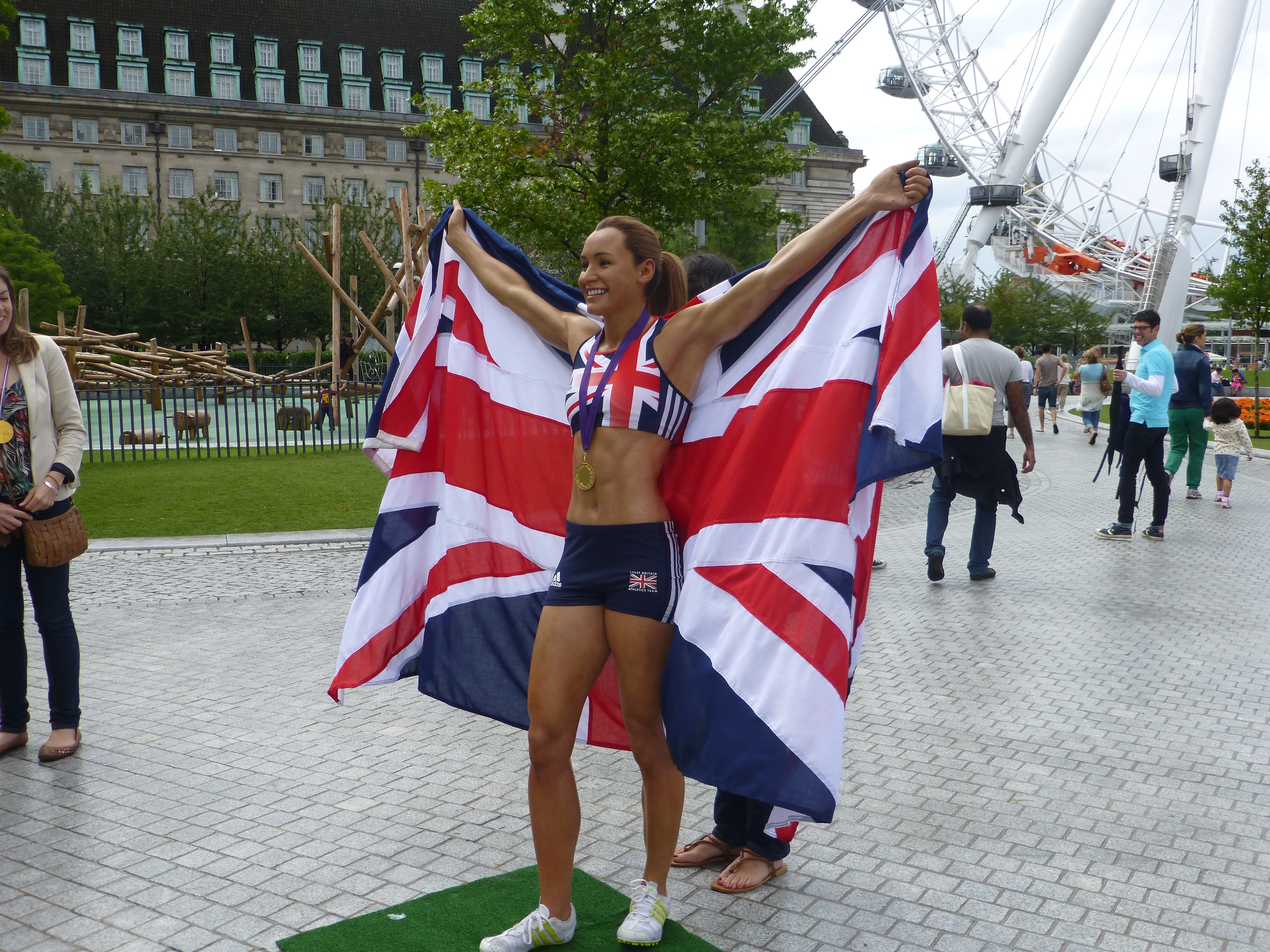 Jessica Ennis (en cire) championne olympique de l’heptathlon à Londres